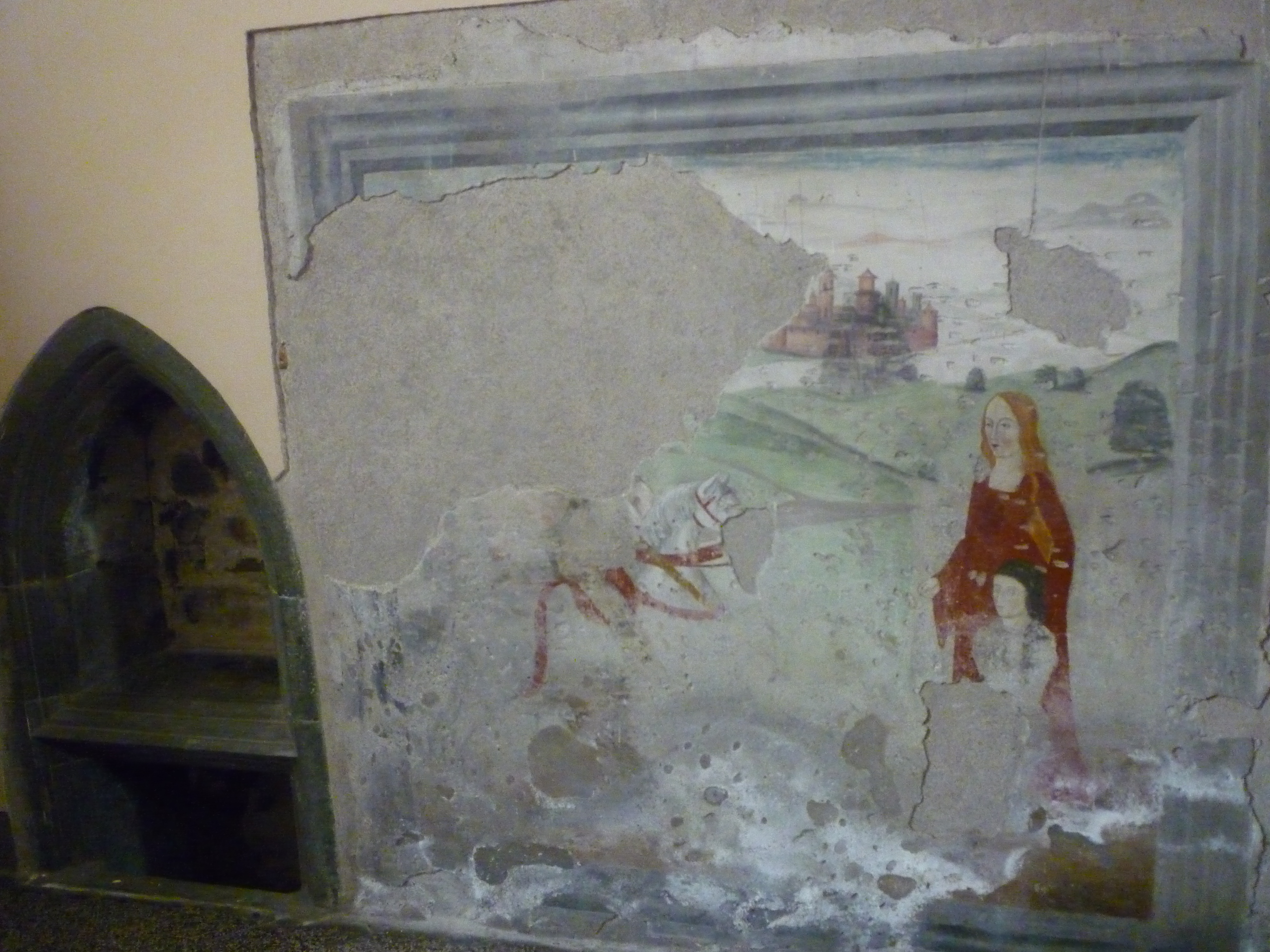 Prévôté de Saint-Gilles (Verrès, Vallée d'Aoste) - fresque